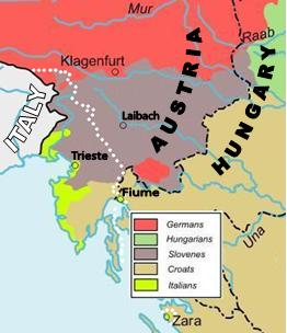 Immagine: composizione etnica della popolazione residente nei territori attribuiti all’Italia con il Trattato di Rapallo in base al censimento austro-ungarico del 1910 tratta in Wikimedia Commons da dettaglio del File:Austria Hungary ethnic.svg caricata il 22/12/2008 da utente Andrein e indicazioni tratte da File:Litorale 1 png caricato il 29/12/2009 da utente Herigon.